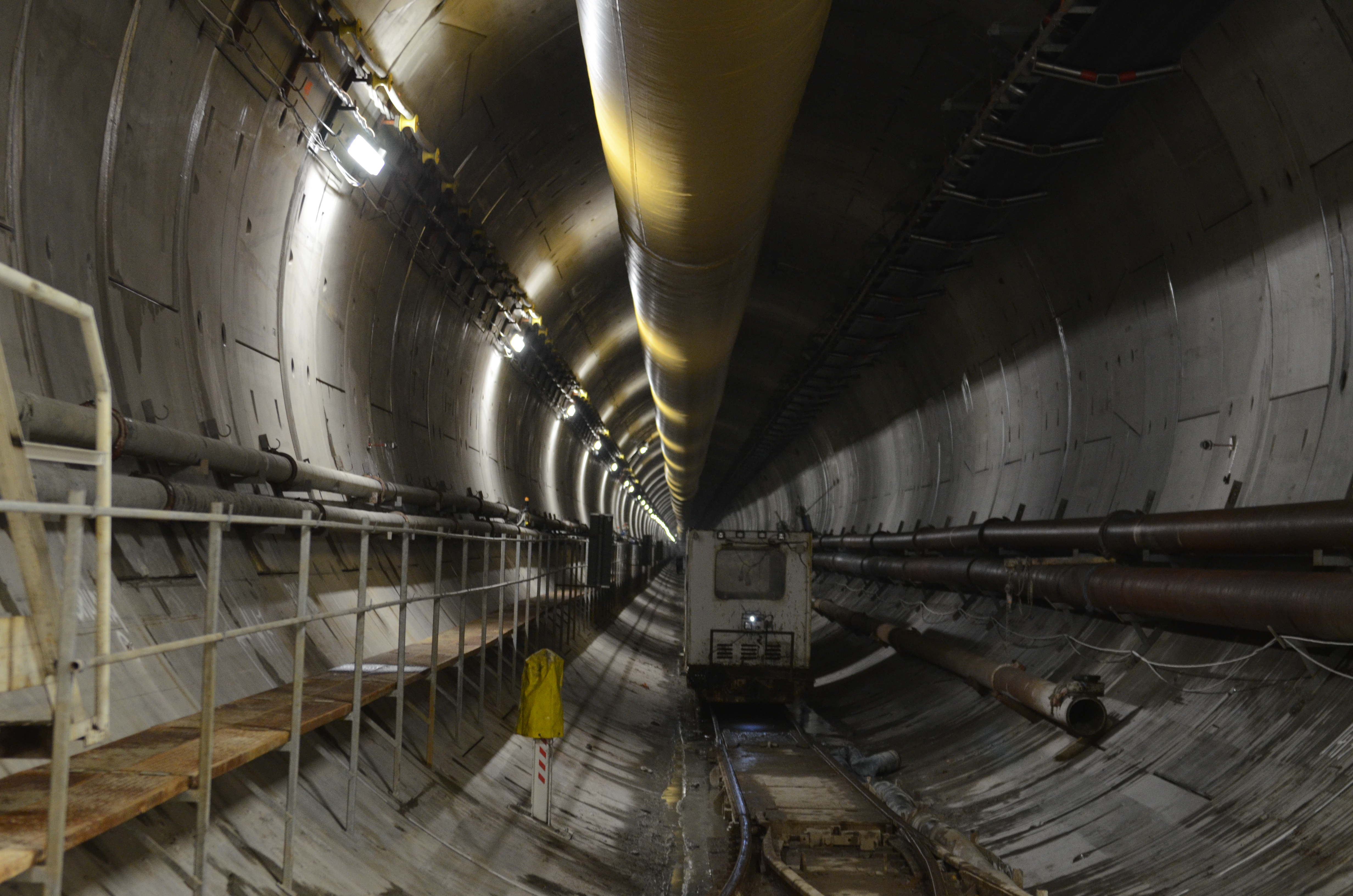 Foto: Louise Andersson/Näringsdepartementet